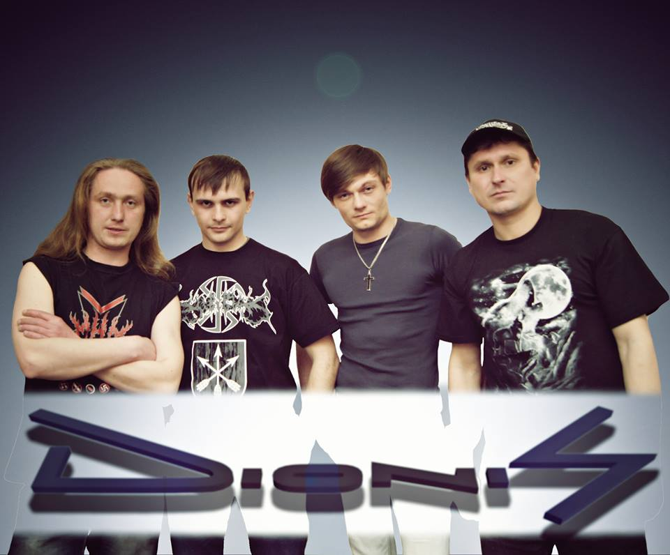 Гурт "Dionis"